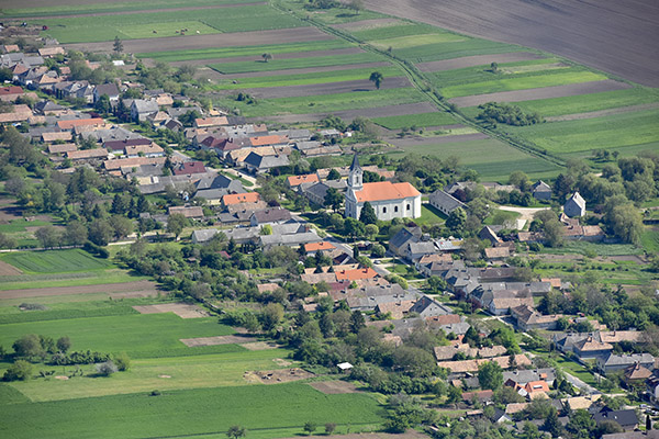 Isztémér, Keresztelő Szent János templom légi fotón